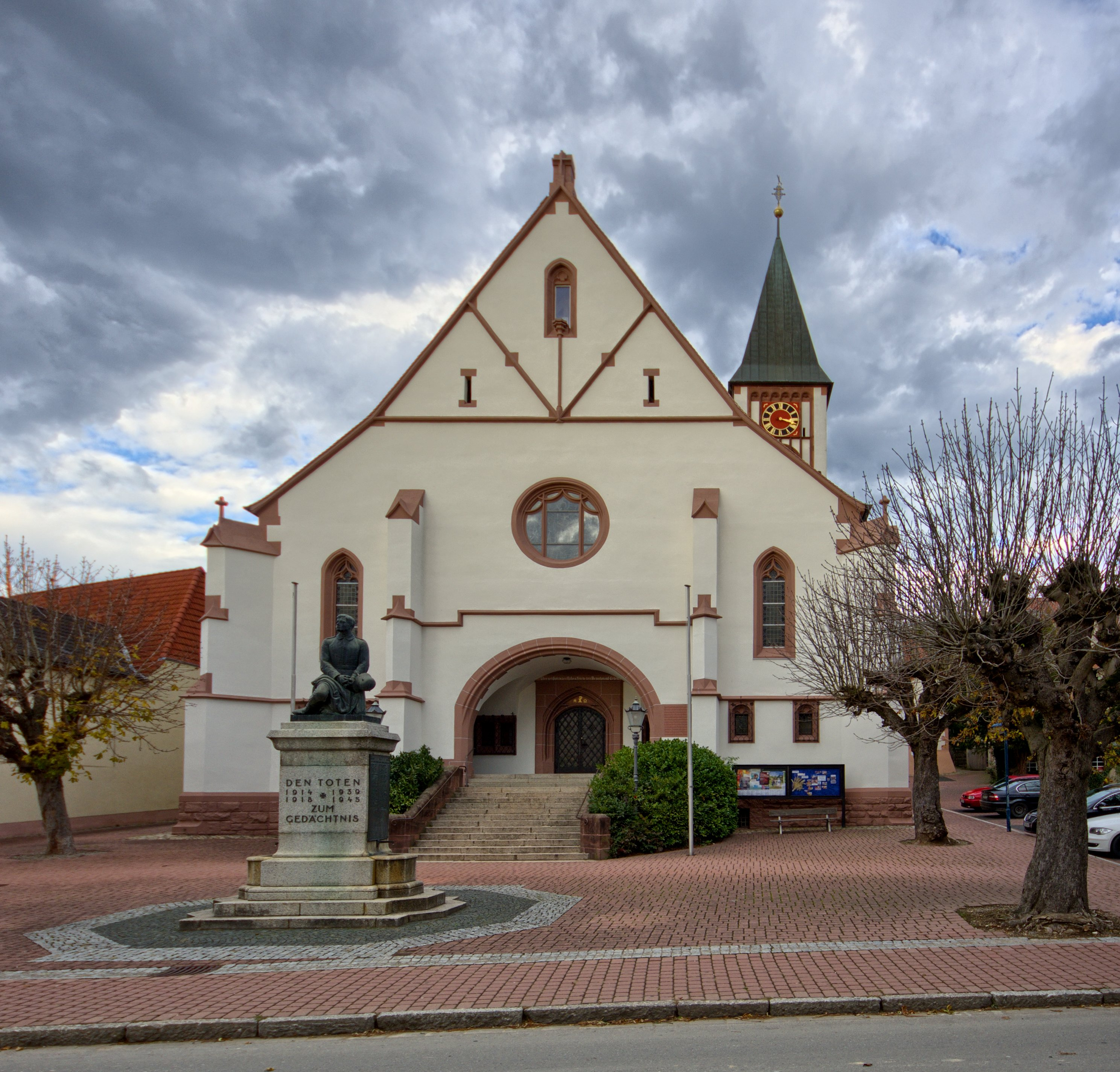 Bilder des Innenraums der St. Georgskirche in Ehrenstetten, einem Teil der Gemeinde von Ehrenkirchen.